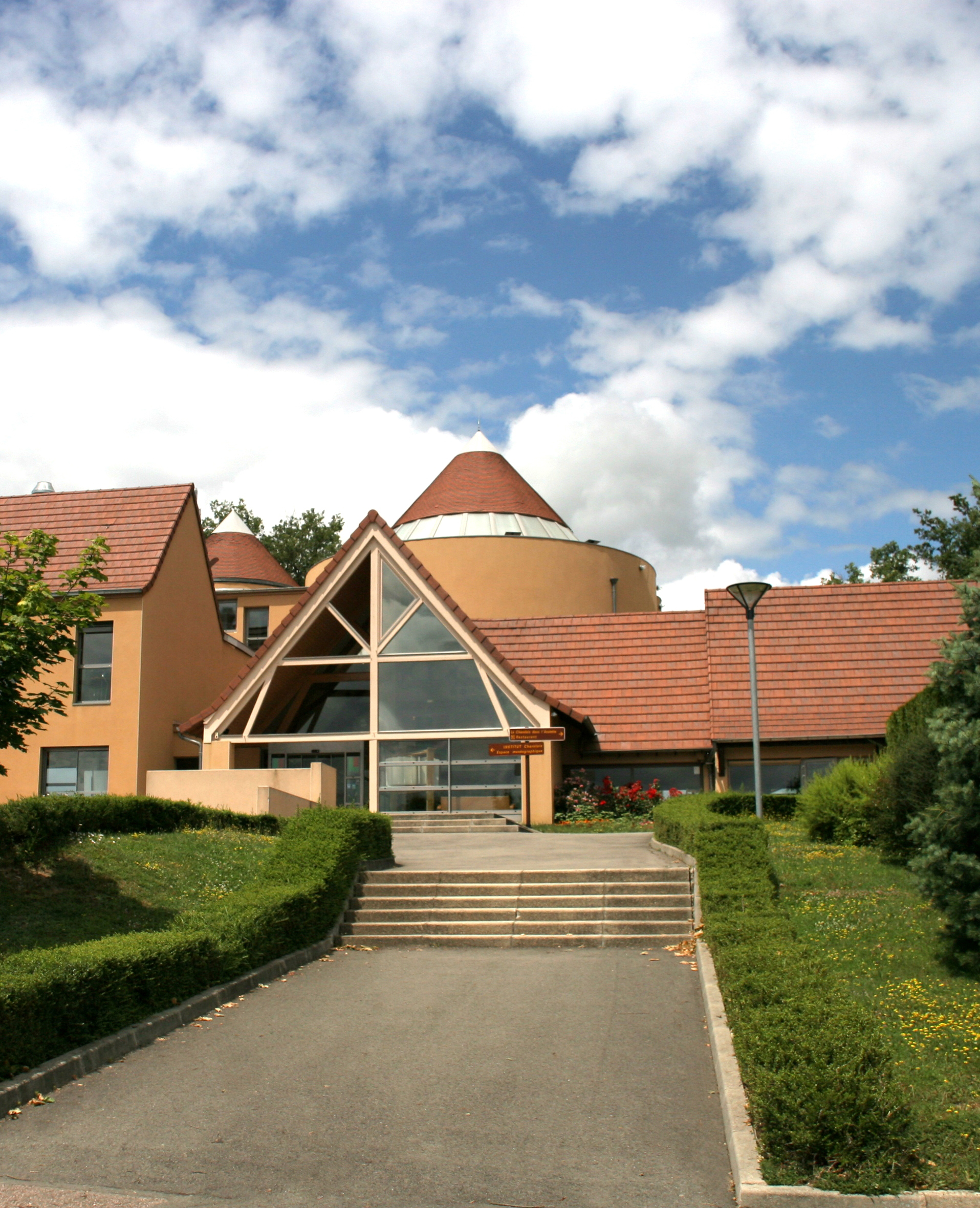 Extérieur Maison du Charolais